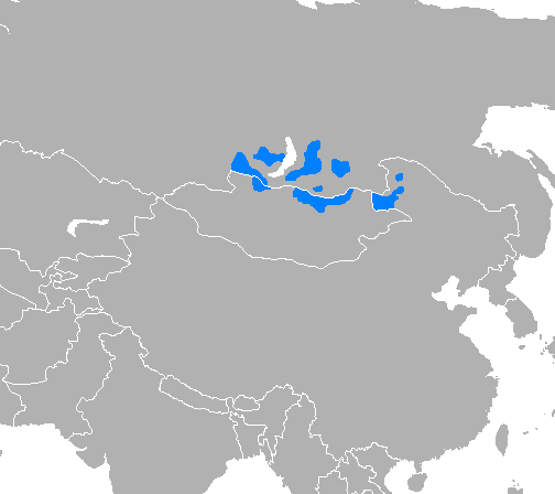 Idioma buriato